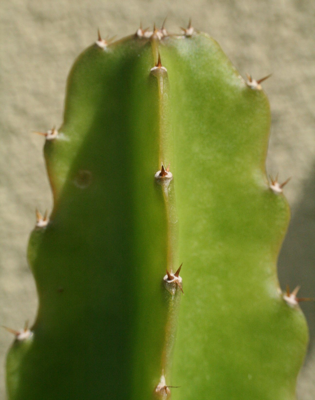 == Licenc: ==